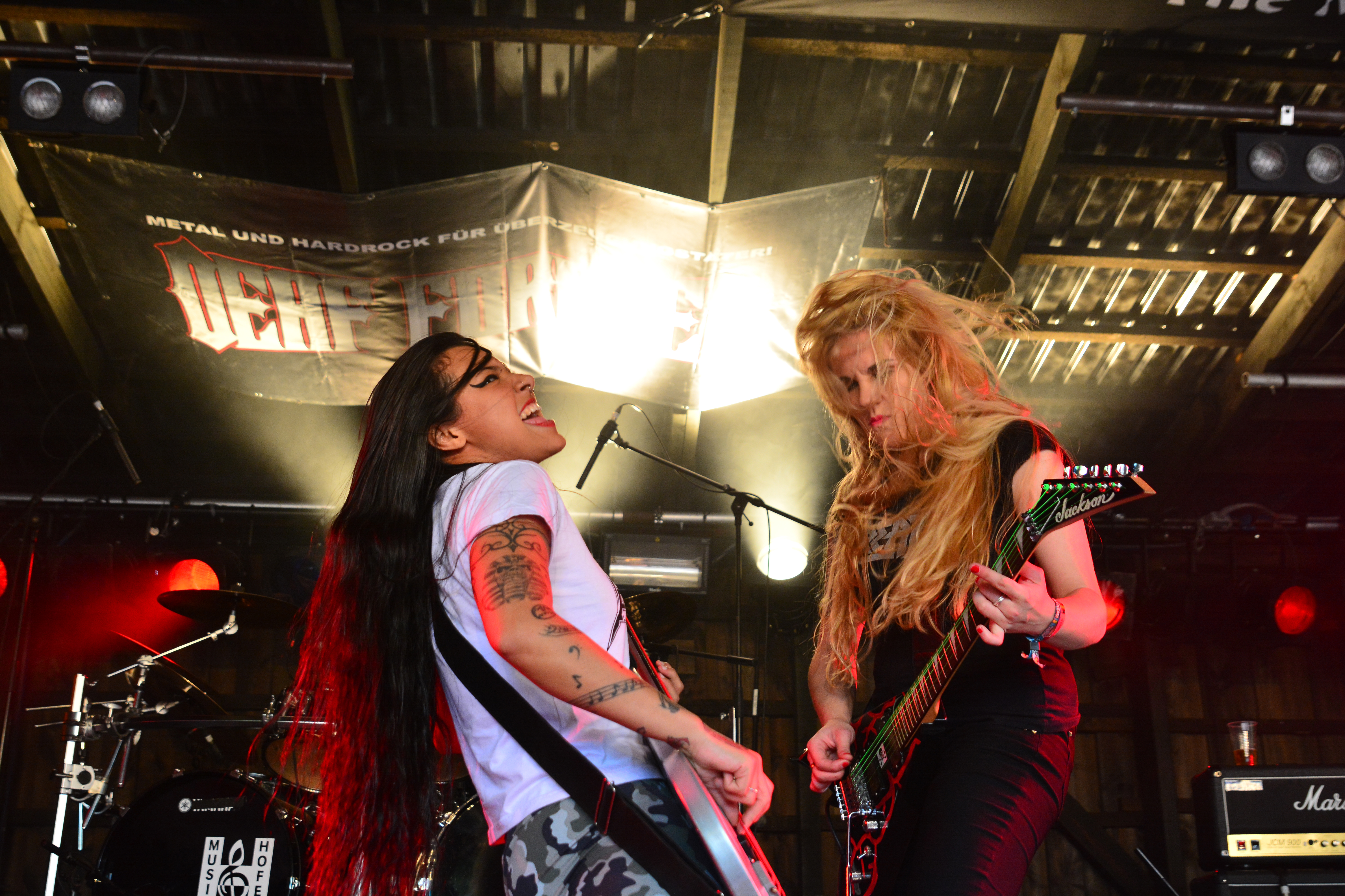 Nervosa beim Headbangers Open Air 2015